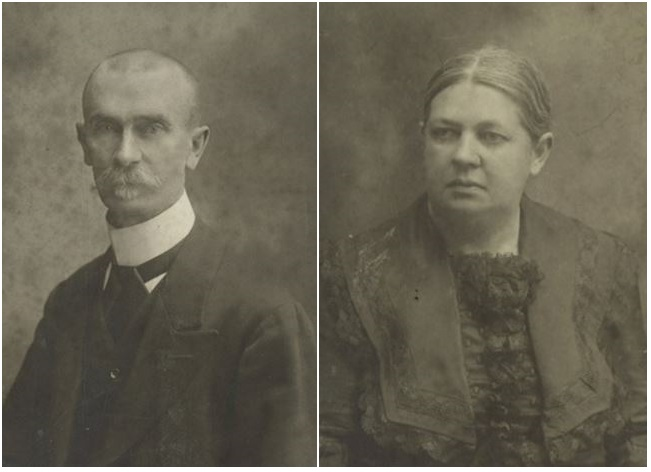 Udvardi és básthi Udvardy Vince és strauszenberghi Strausz Borbála, udvardi és básthi dr. Udvardy Jenő jogász, főkormánytanácsos szülei